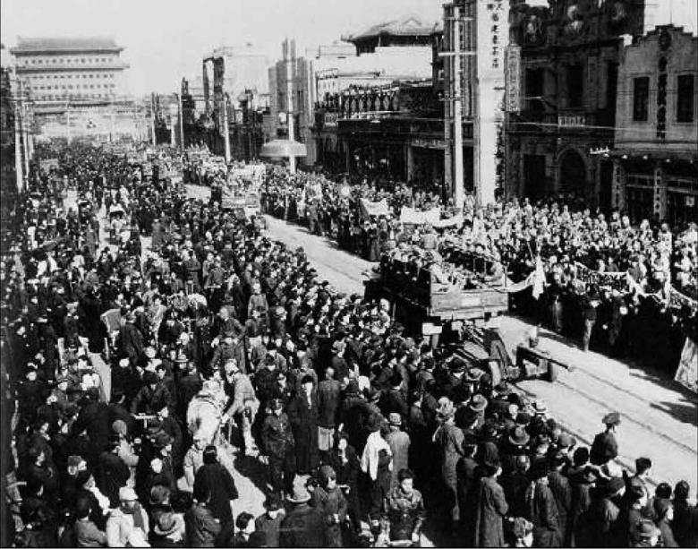 共產黨士兵進入北平。